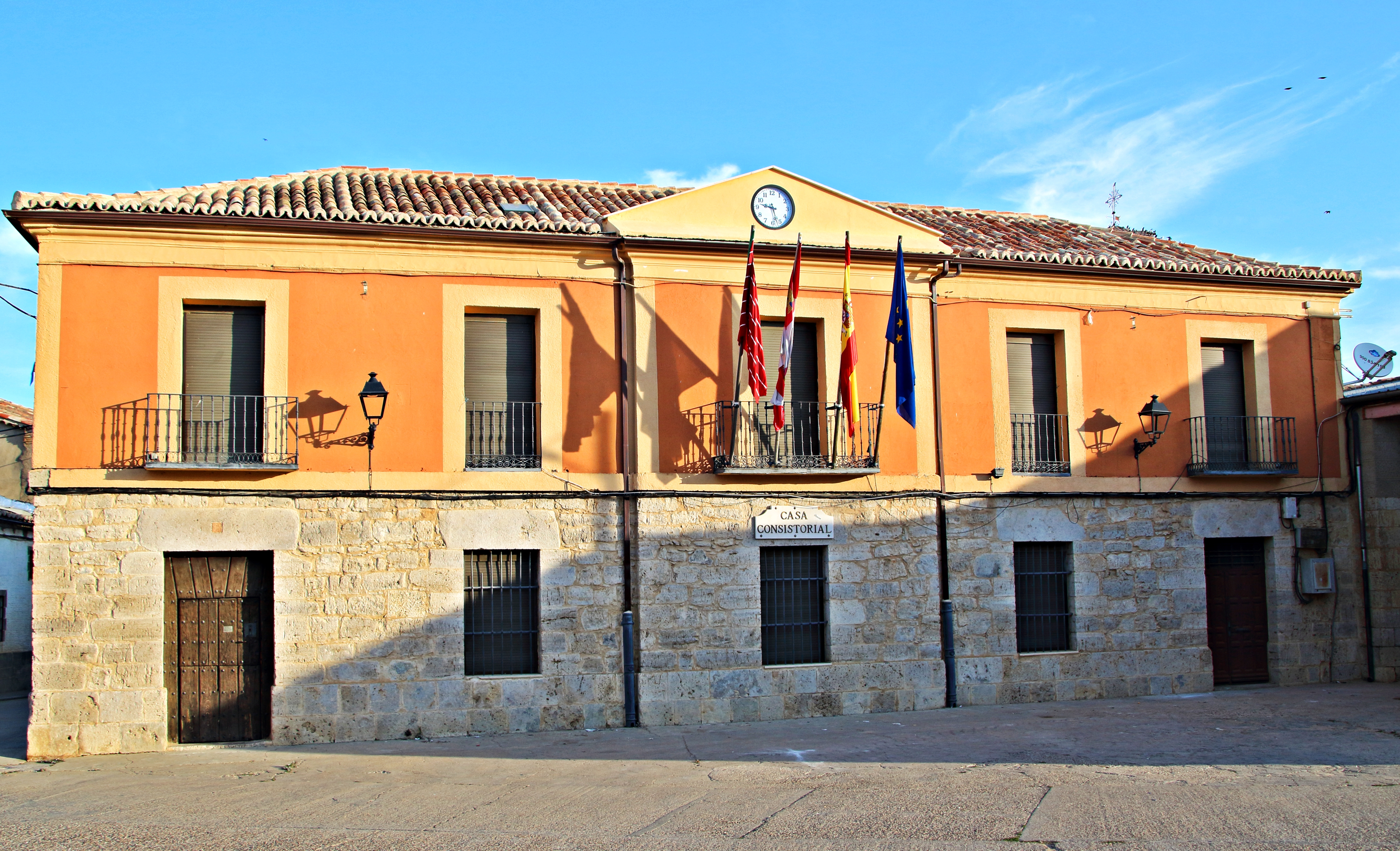 Villavendimio, Zamora